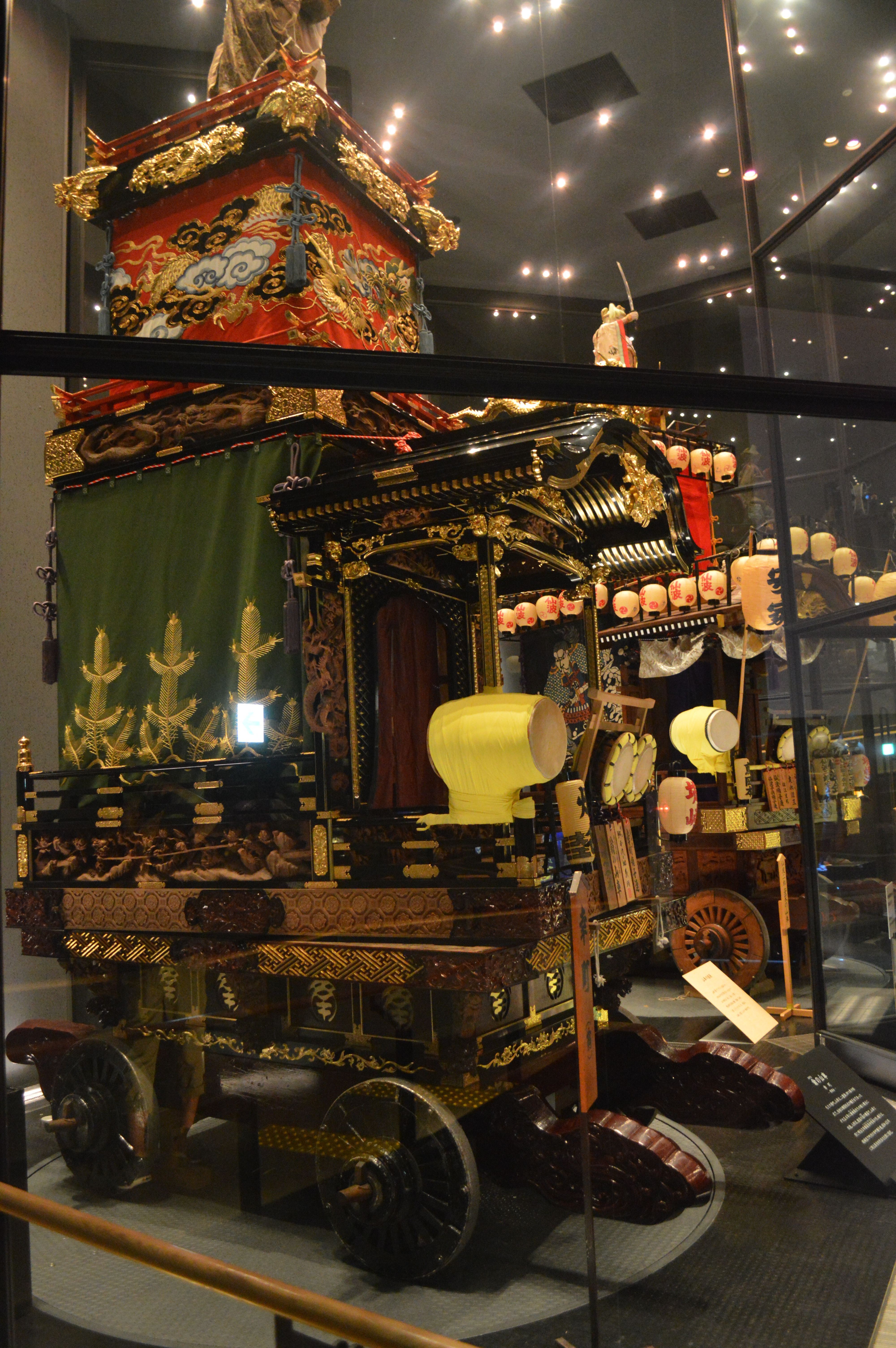 埼玉県川越市の川越まつり会館